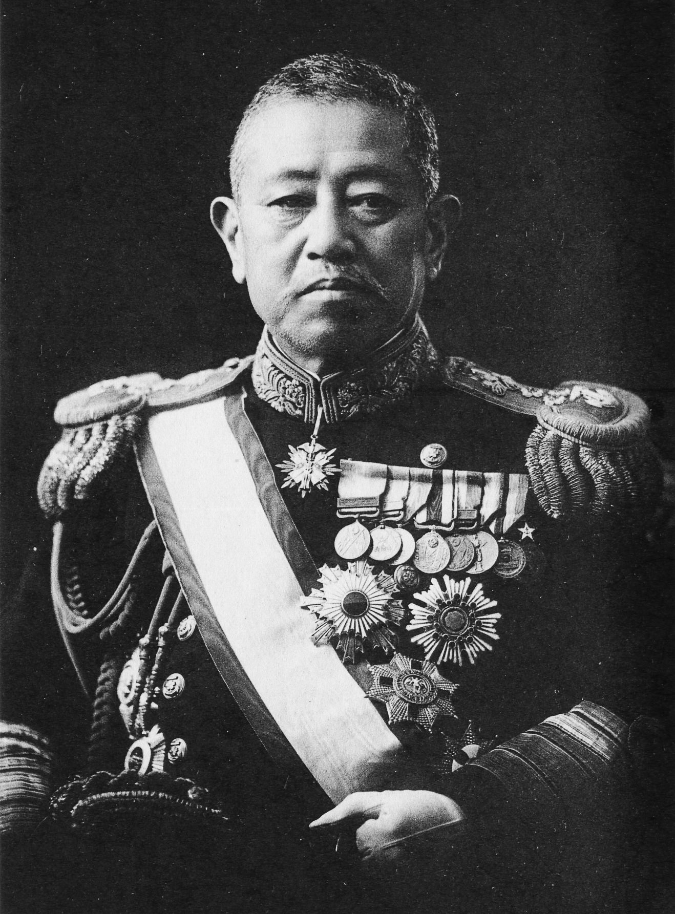 この写真は、加藤寛治（1870 - 1939）の肖像写真です（1935年撮影）。